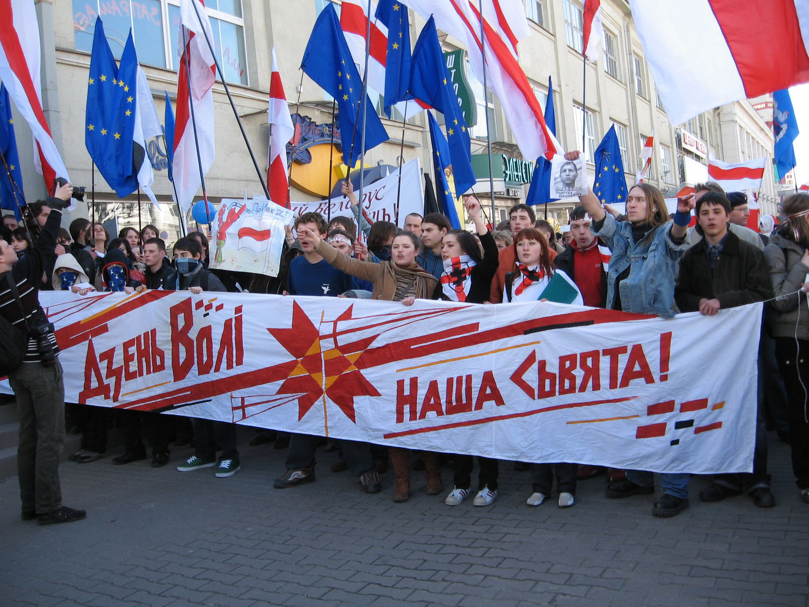 Мітынг апазыцыі. 25 сакавіка 2007 году. Менск, Беларусь.